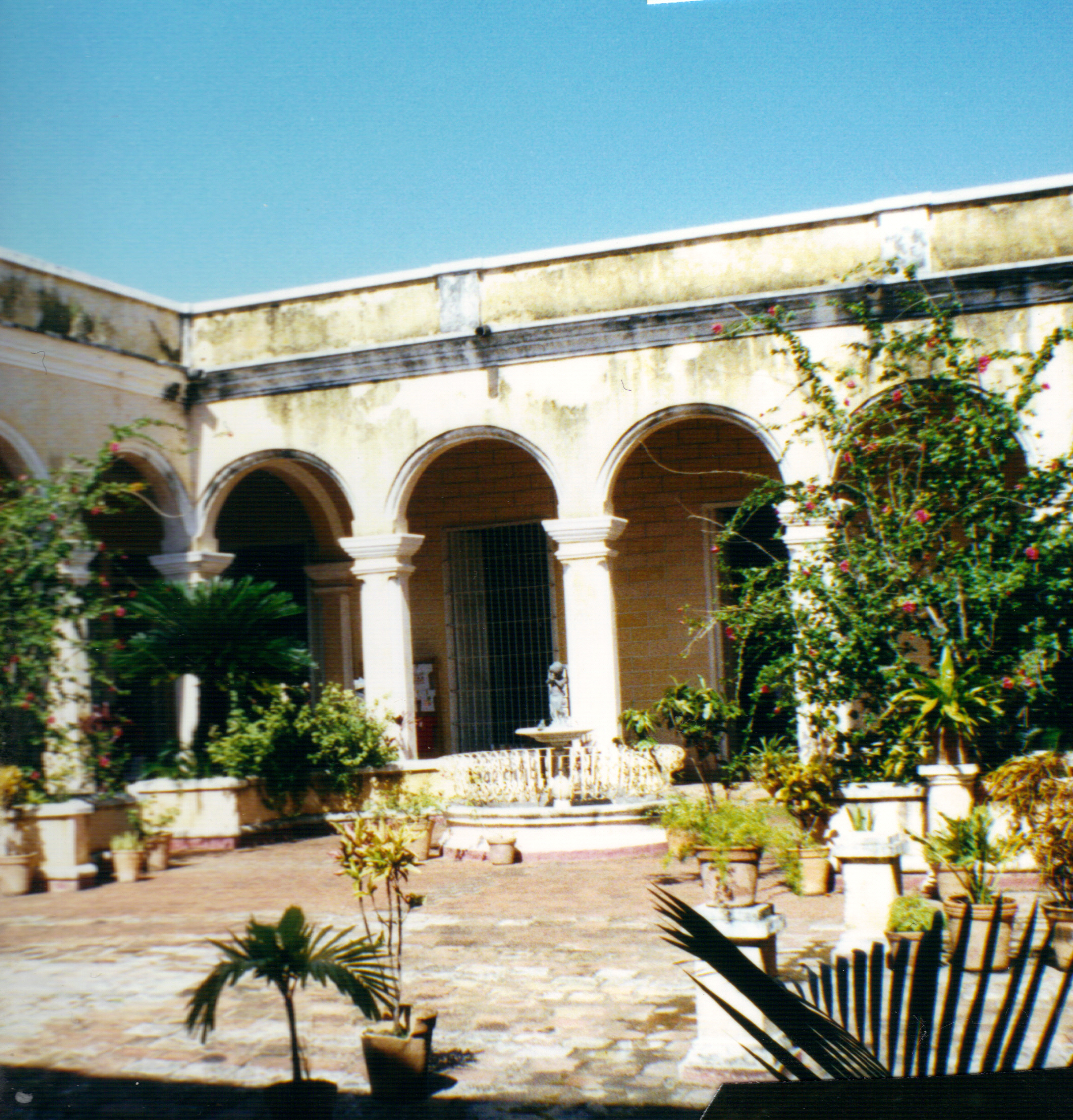 Le Musée Municipal Général de Trinidad (ancien palais Cantero), Trinidad, Cuba.